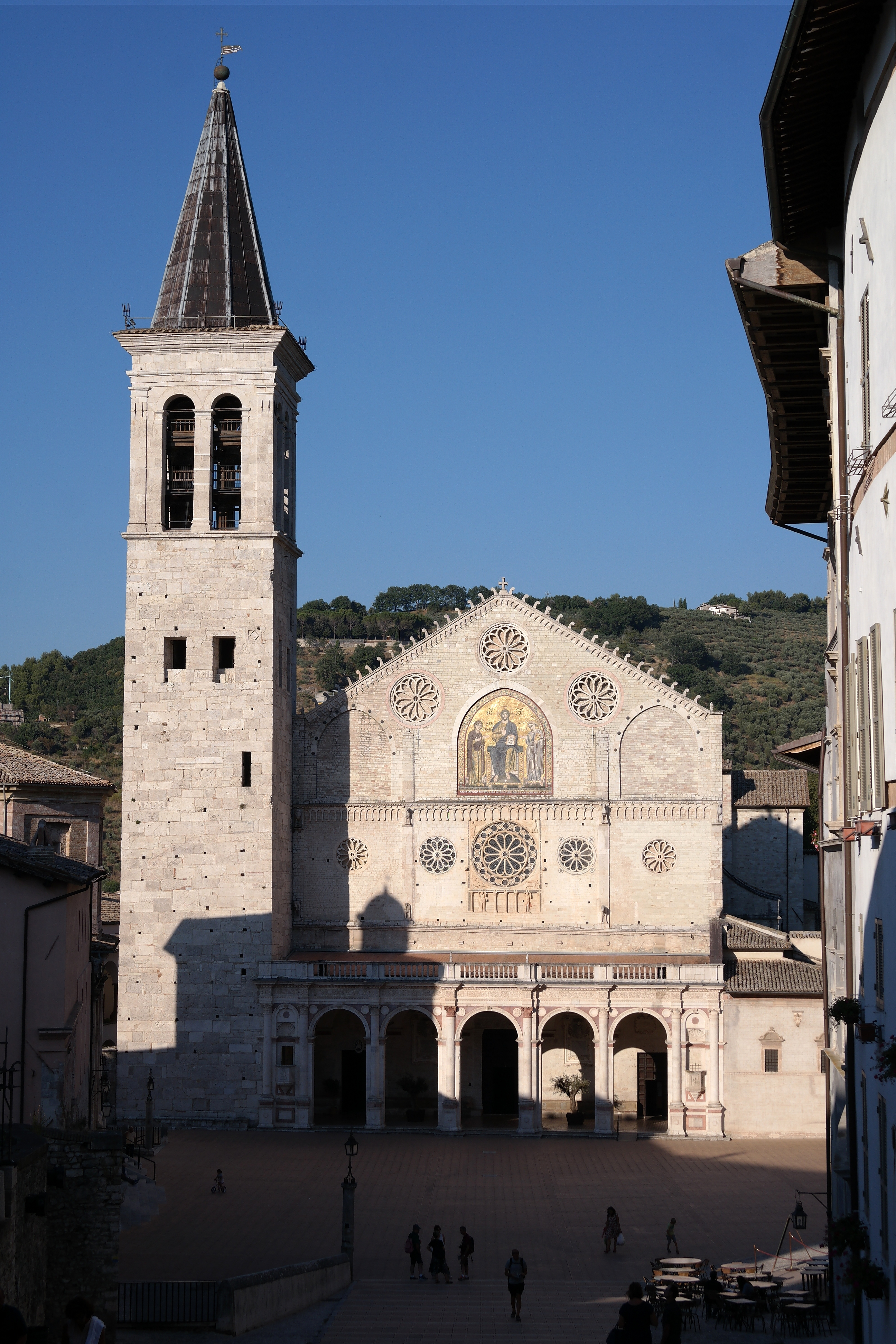 Facciata del Duomo di Spoleto